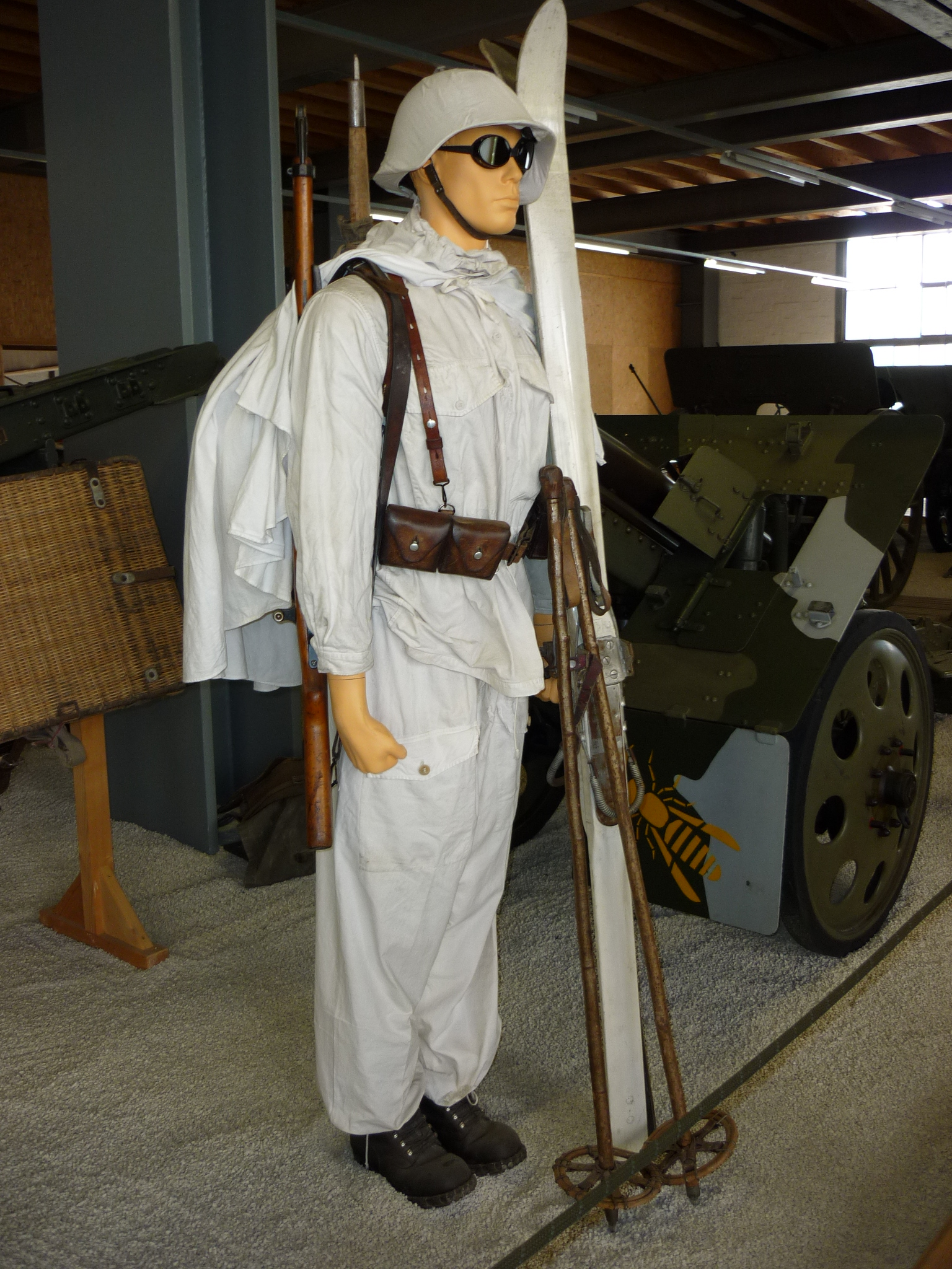 Schweizer Gebirgssoldat mit Winterausrüstung, Schweizerisches Armeemuseum Full AG, Schweiz